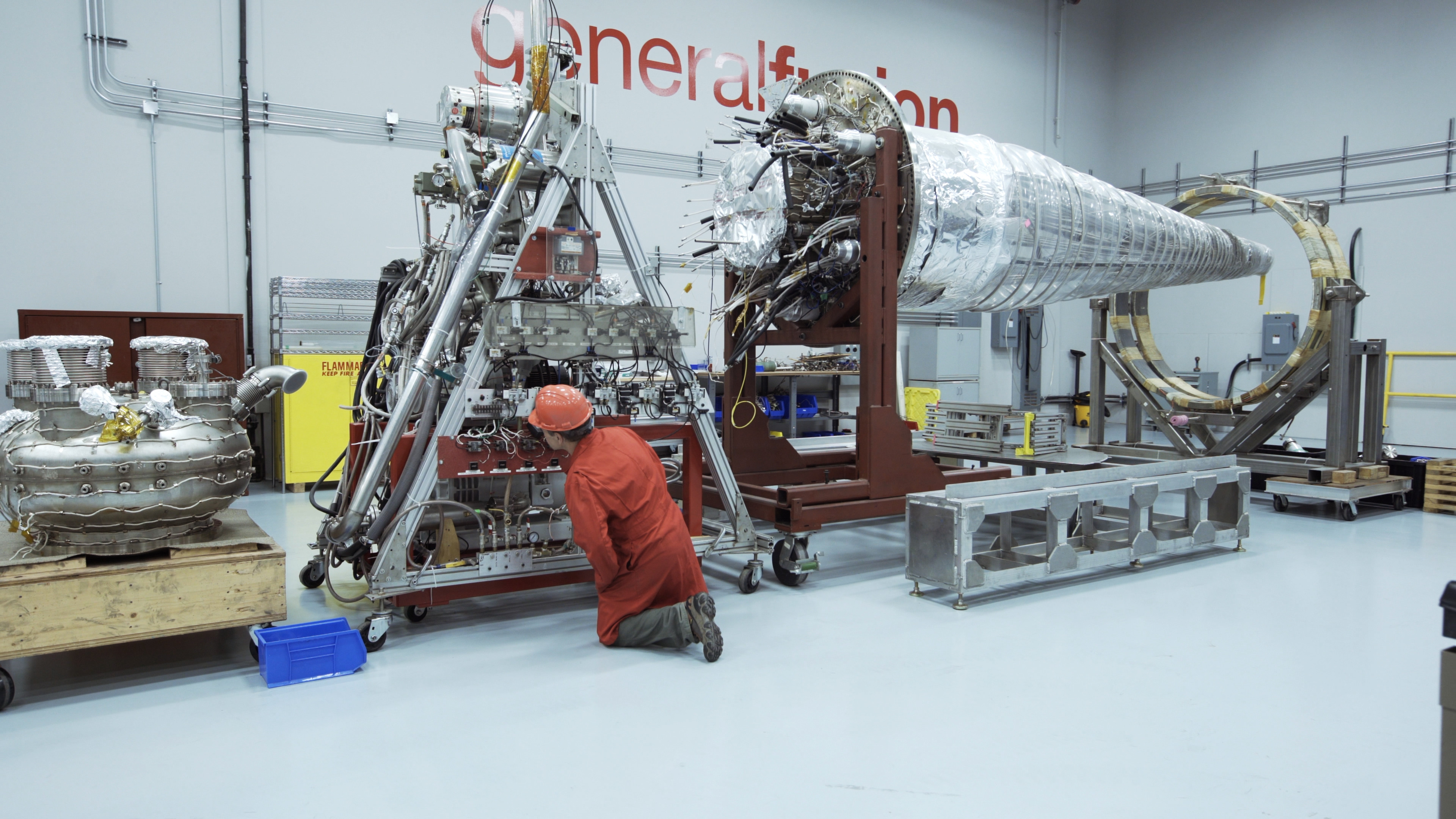 General Fusion plasma injector